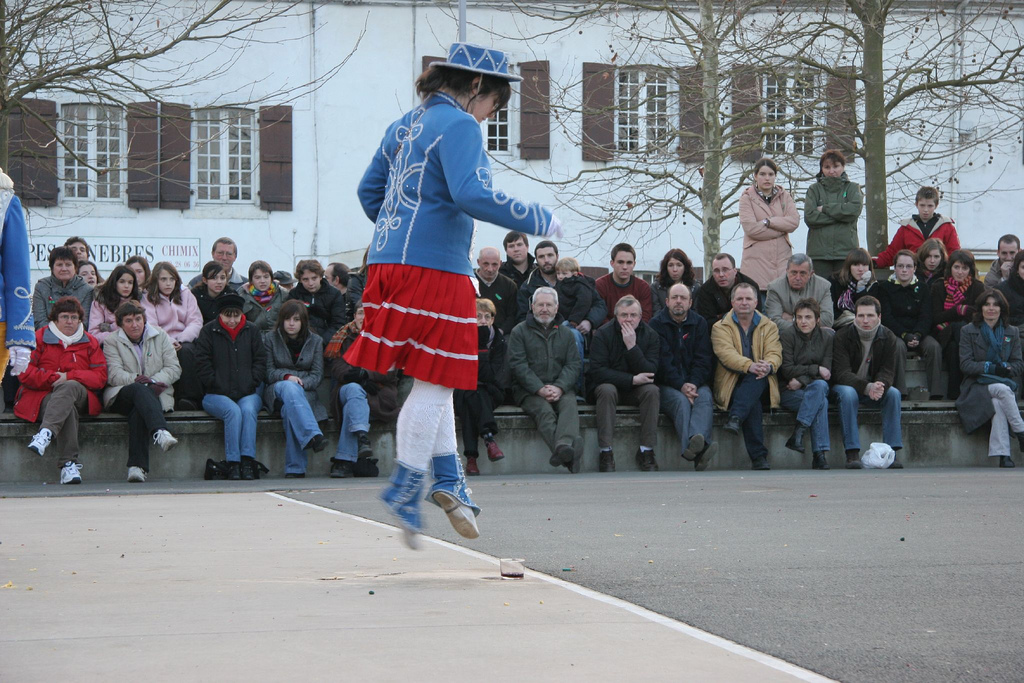 Kantiniersa dantzan 2007ko Mauleko maskaradan